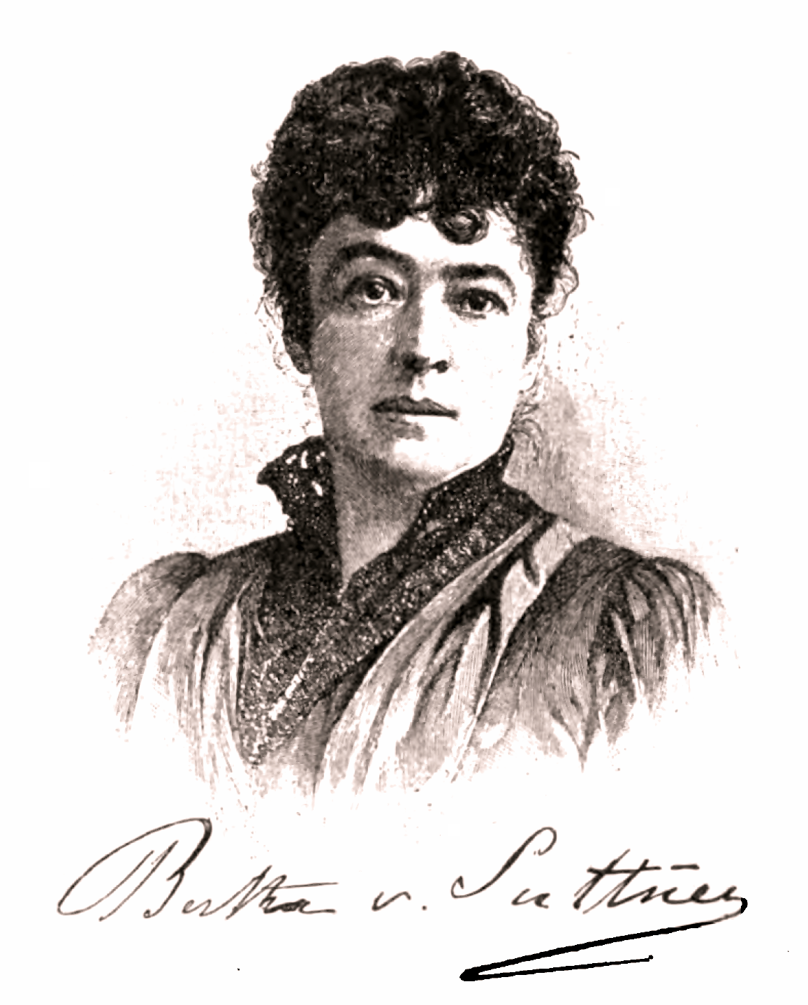 Bertha von Suttner (1842-1914), Schriftstellerin, Friedensnobelpreisträgerin